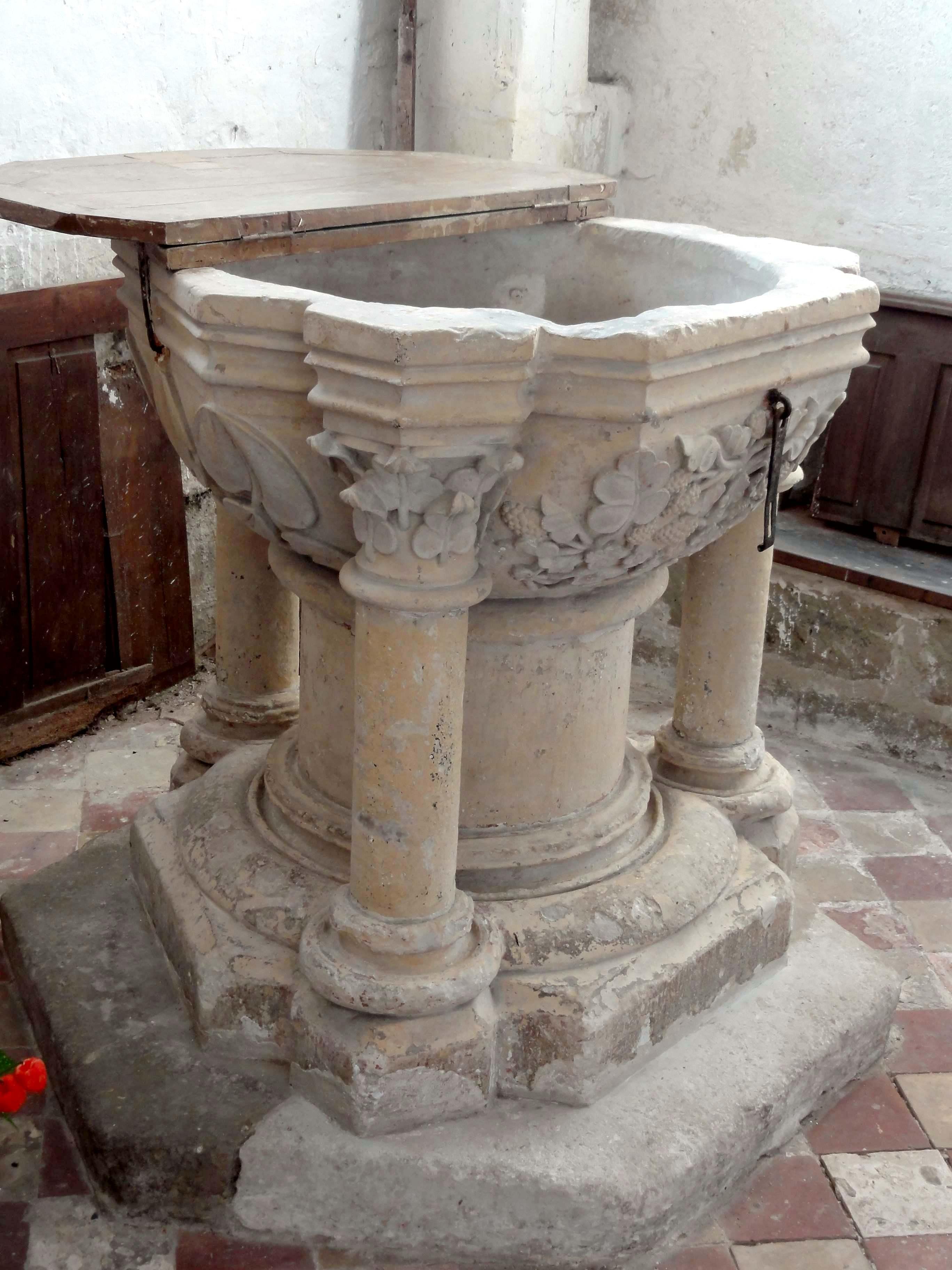 Mobilier de l'église - voir titre.